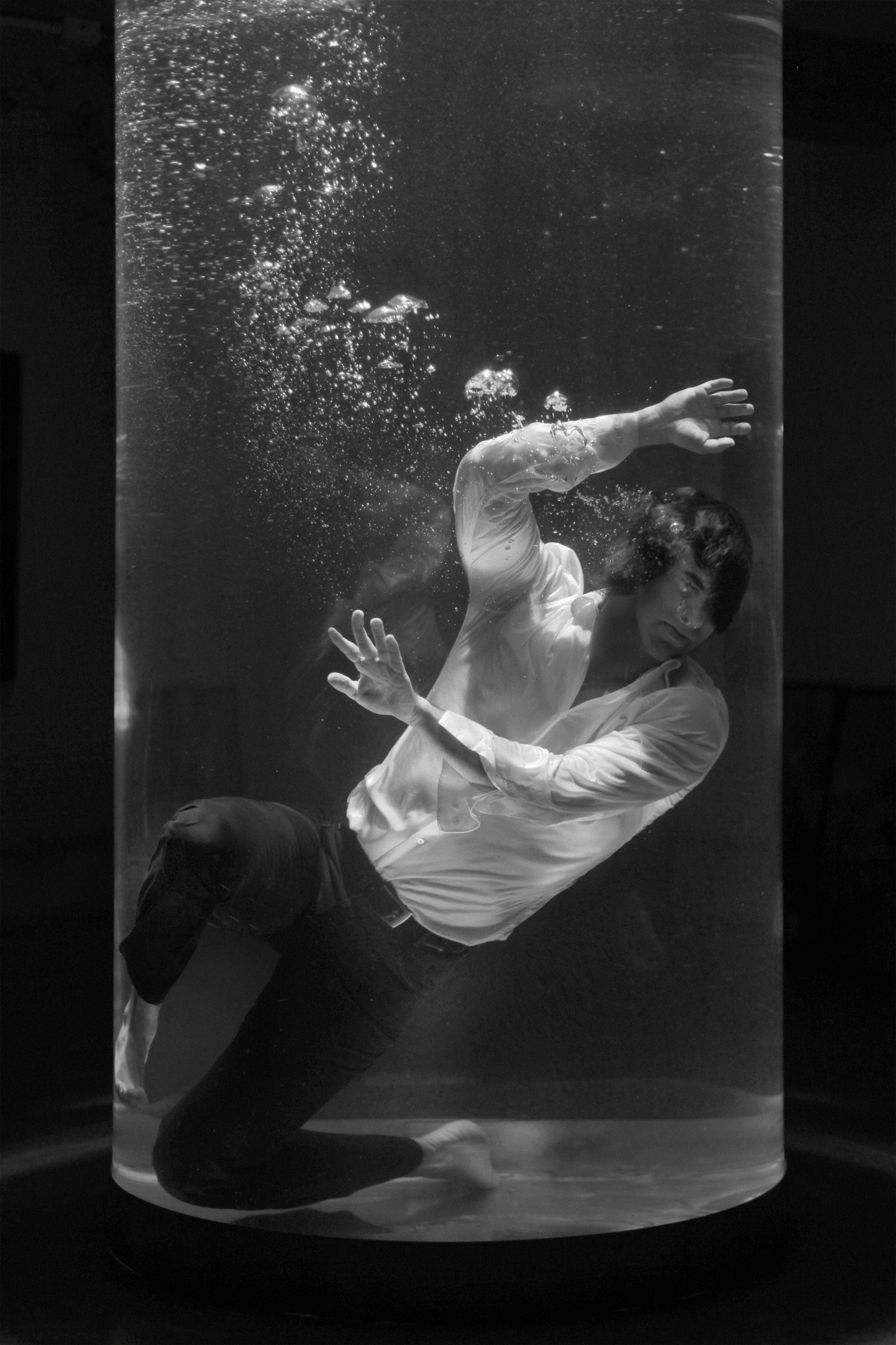 No espetáculo Água (2011), Lorenzon fica submerso em um aquário gigante com 3 toneladas de água.